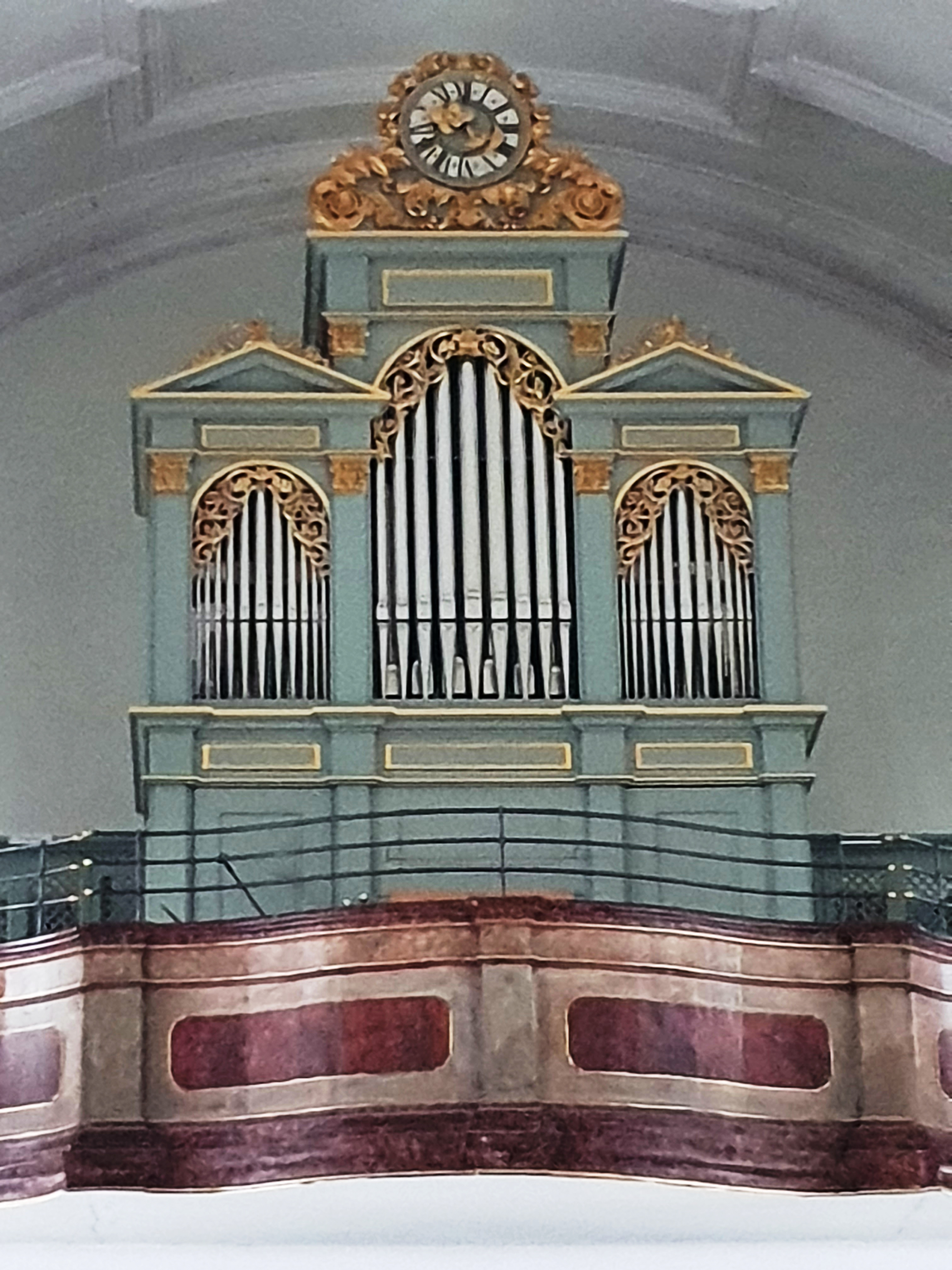 Gehäuse von Johann Nepomuk Carl Mauracher 1859, Werk von Johannes Klais 2017, Bergheim